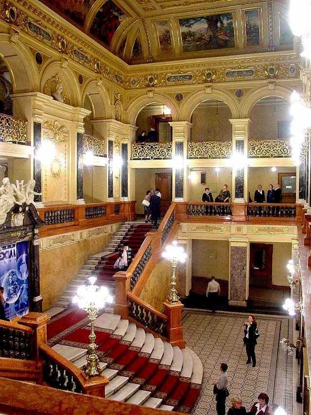 Westybul Teatru Wielkiego we Lwowie - fotografia wykonana we wrzesniu 2003. Autor: Stanisław Kosiedowski